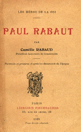 Aragonés: Les héros de la foi - Paul Rabaut Fischbacher - 1921.